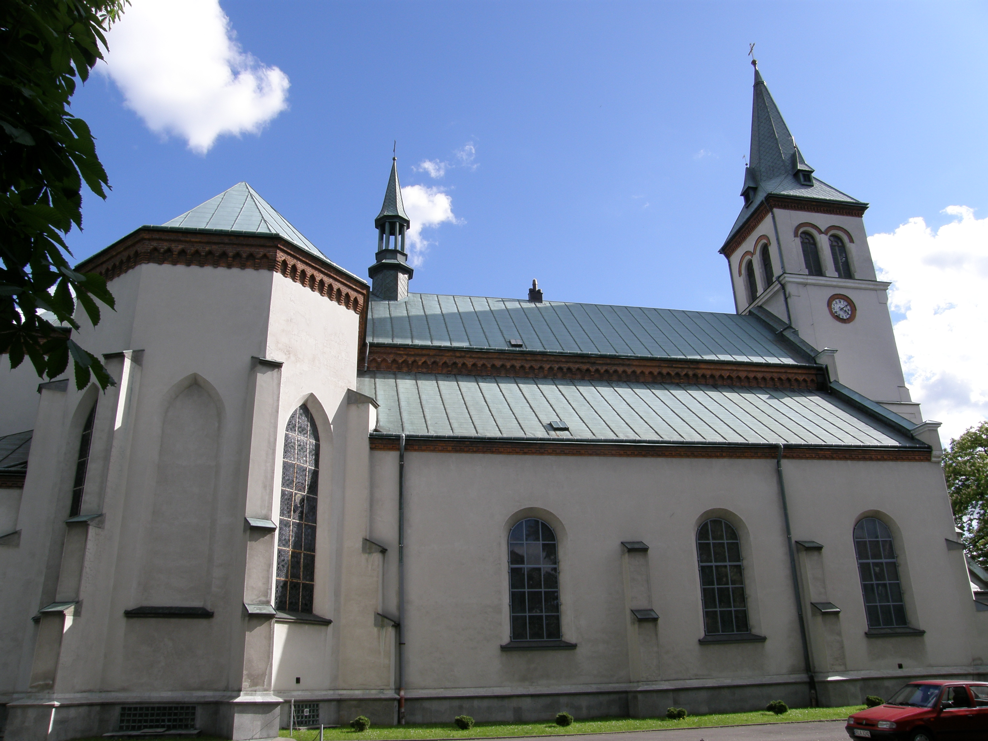 Kościół farny - widok z boku